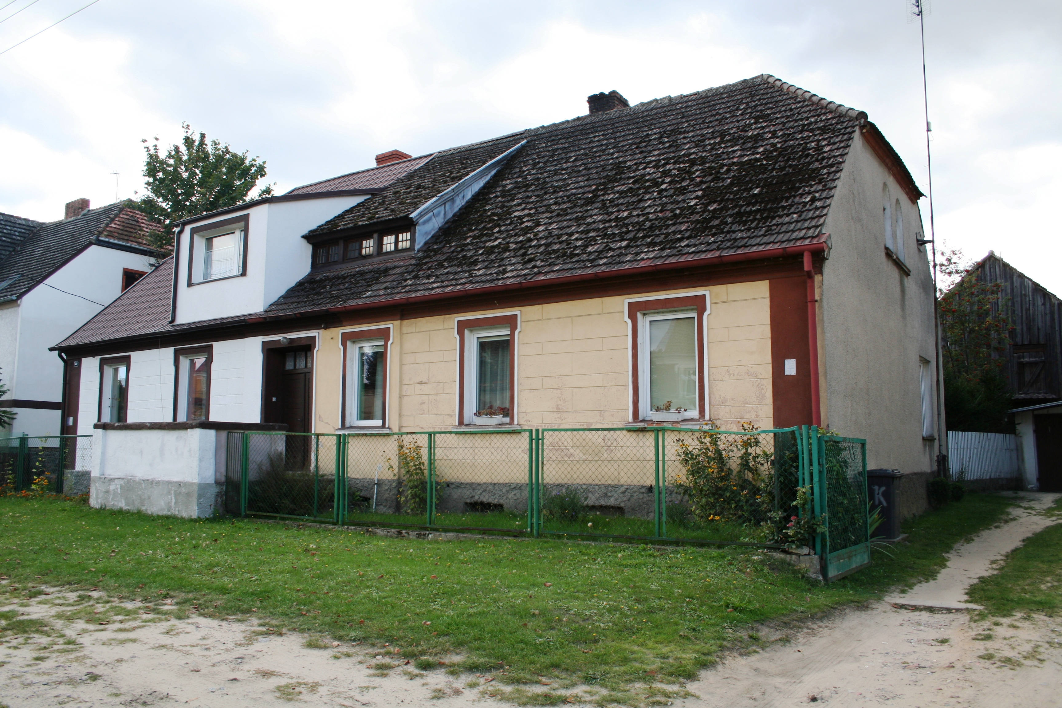 Budynek byłej 8 komendy odcinka Cybinka